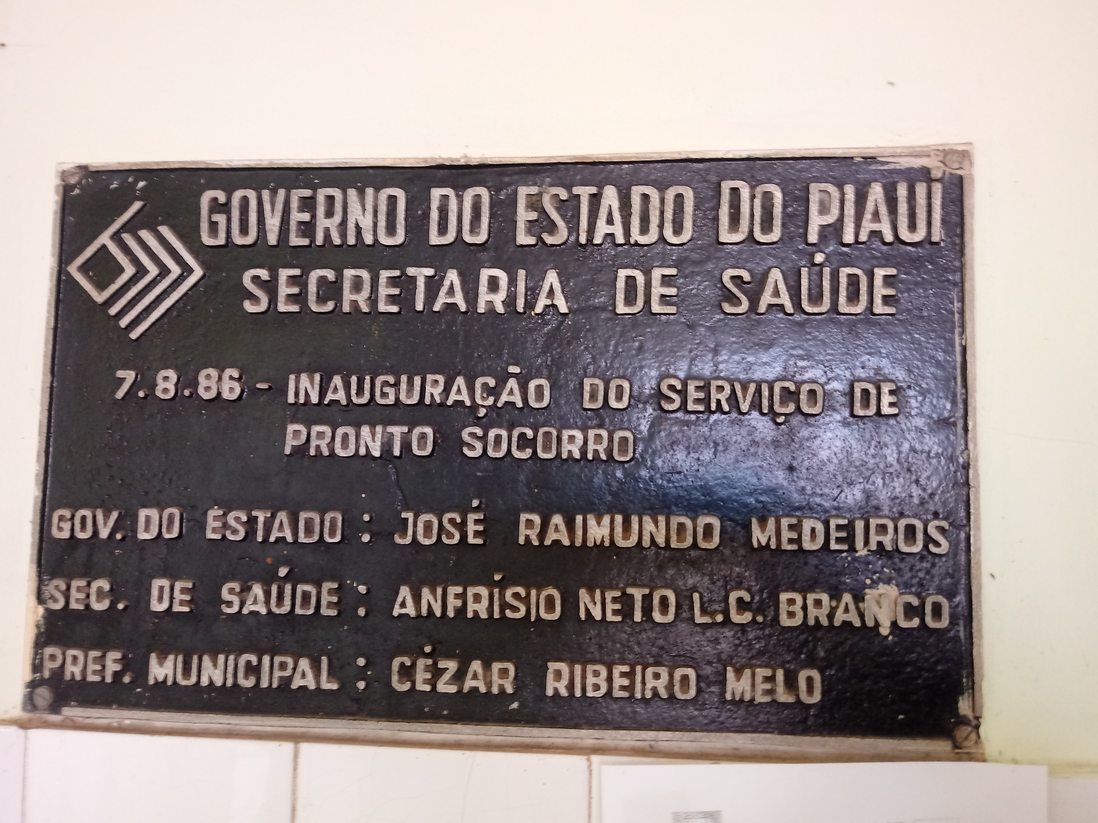 Placa de inauguração do serviço de pronto socorro do Hospital Regional de Campo Maior em 1986.